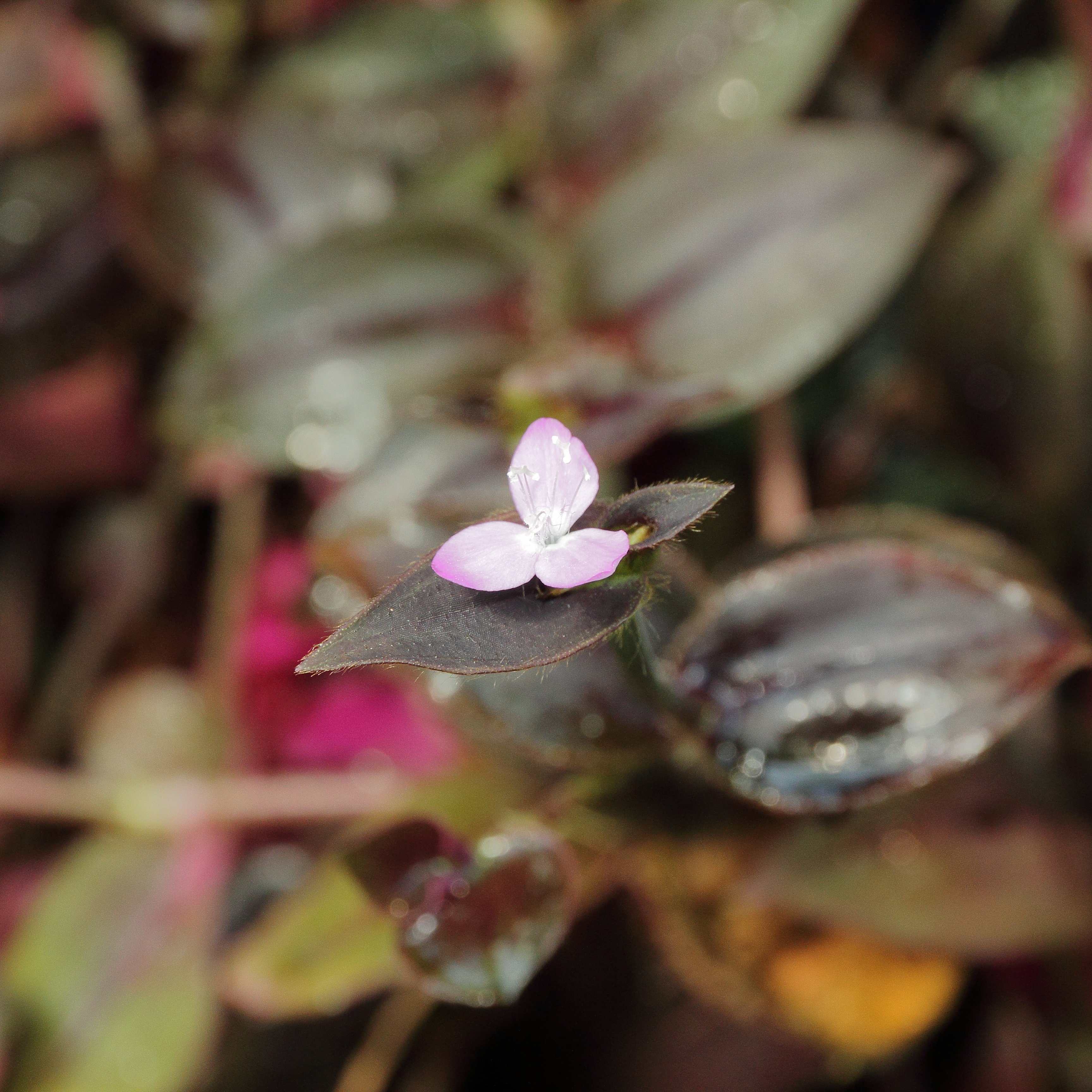 Tradescantia zebrina 'Purpusii' i Bergianska trädgården.